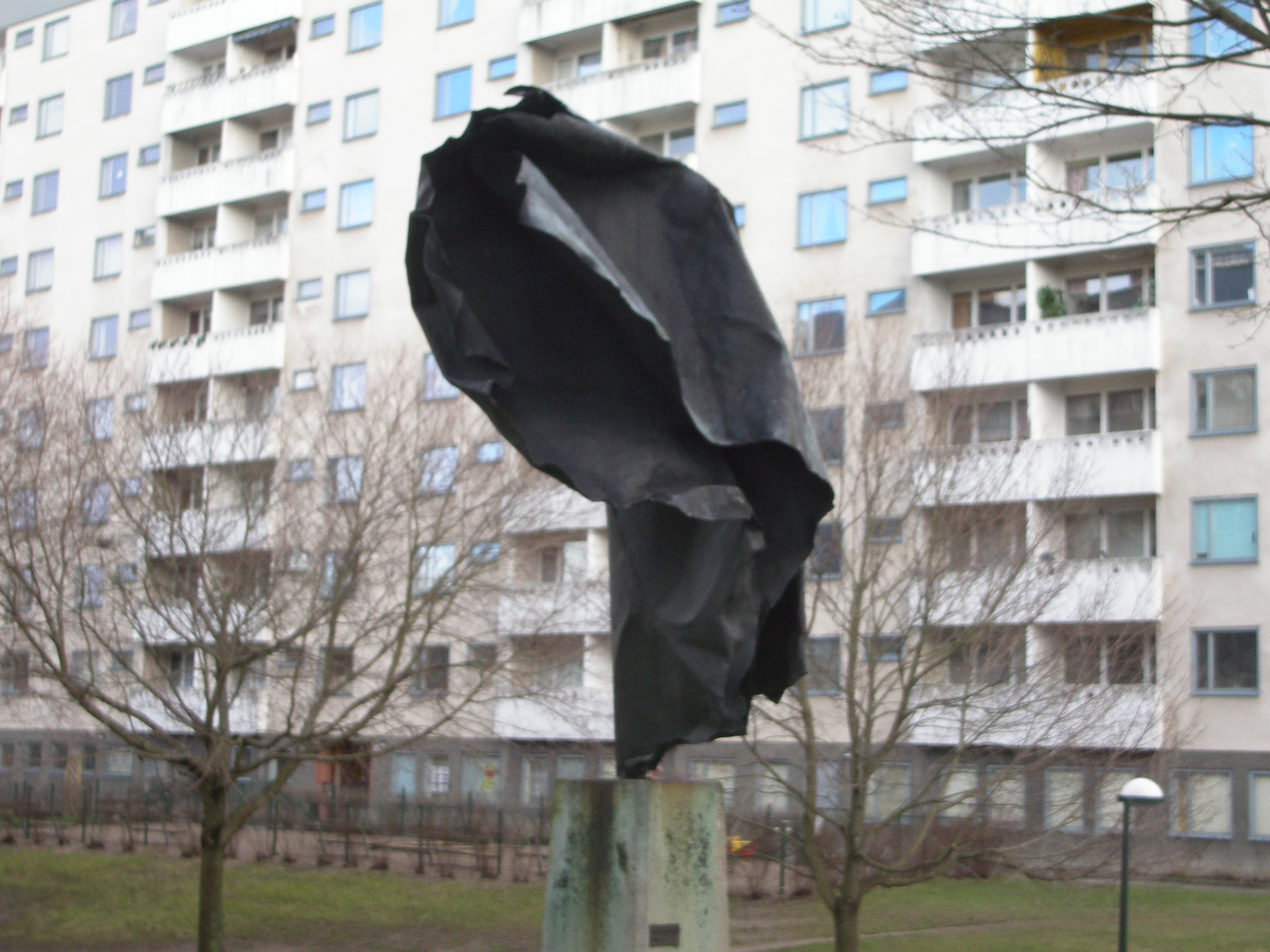 Tony Emilssons Nike kopparplåt (1965), Vita Liljans väg i Bredäng i Stockholm.